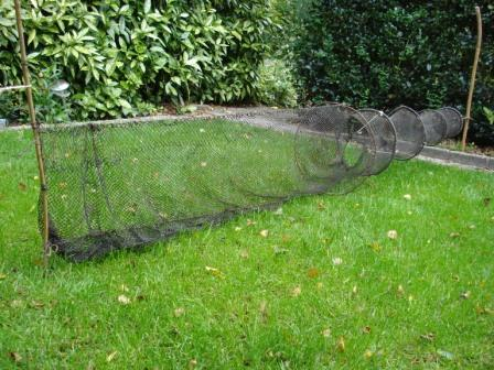 eenvleugelige aalfuik te drogen gezet